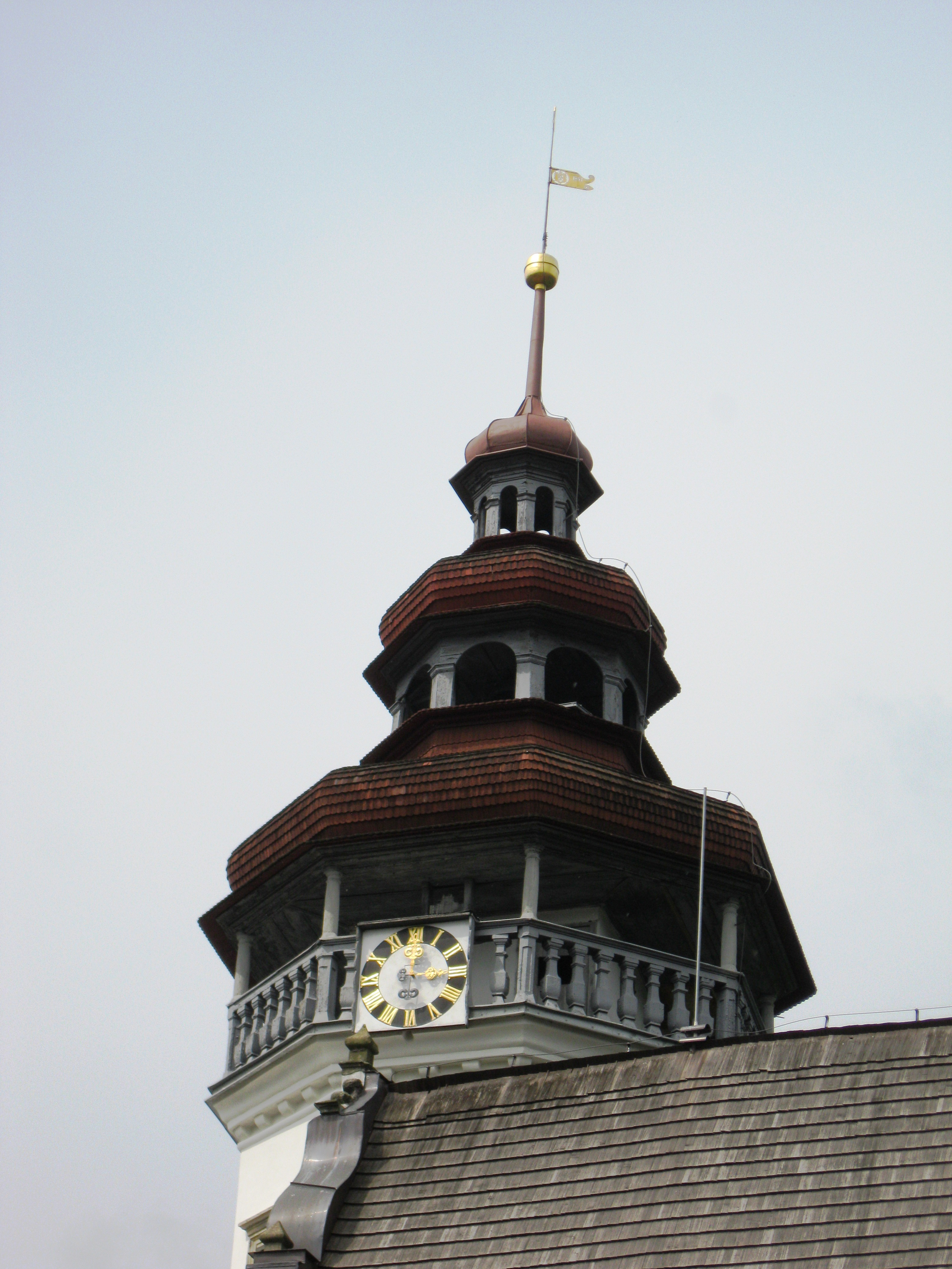 Zámek Velké Losiny, Velké Losiny 268